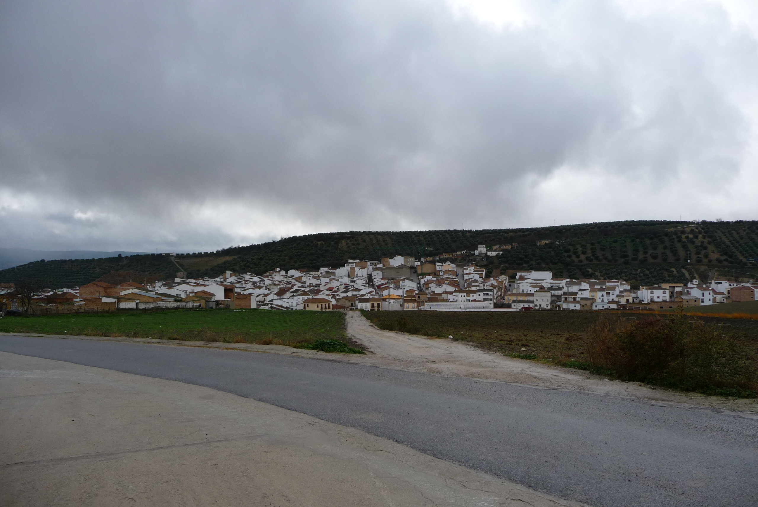 Alcala del Valle (Andalusia, Spain).